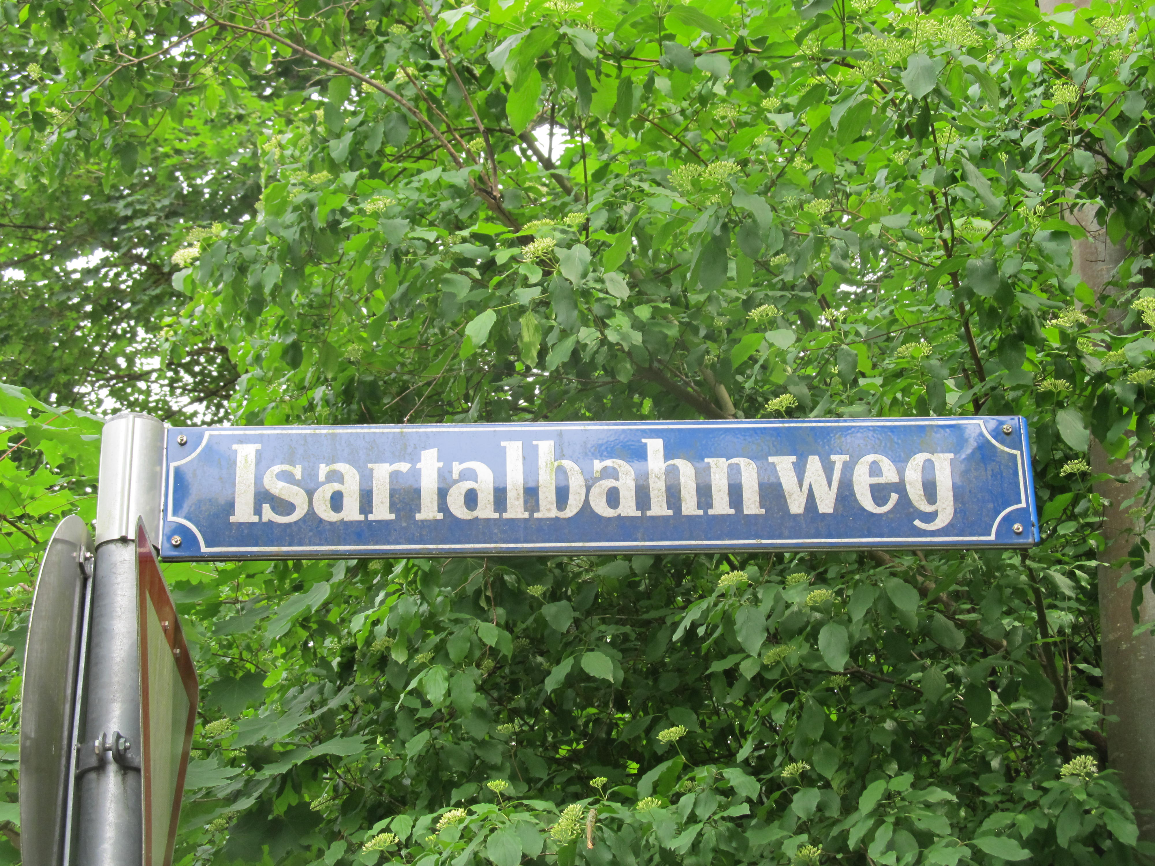 Straßenschild des Isartalbahnwegs